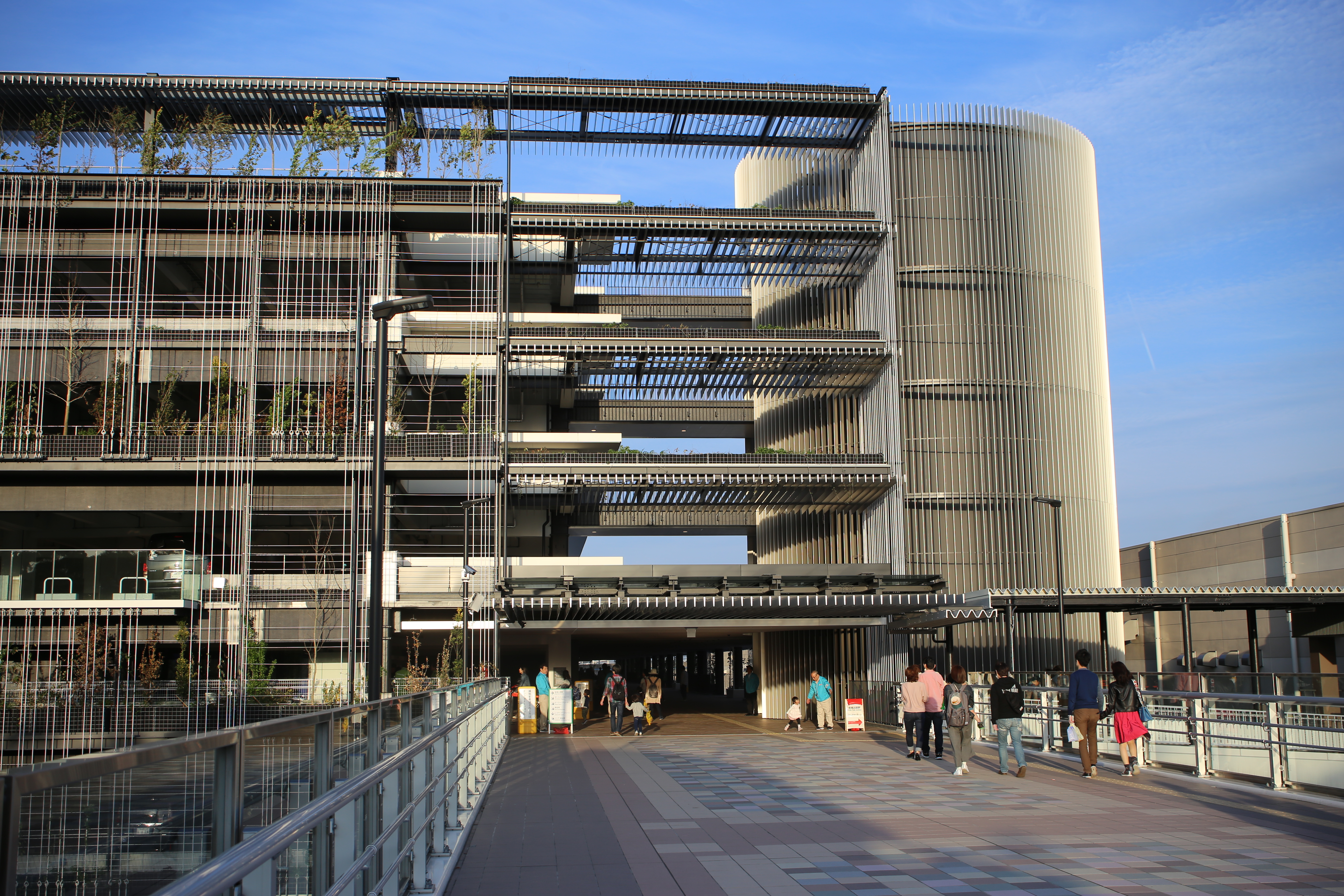 名古屋市港区金城ふ頭の名古屋市営金城ふ頭駐車場